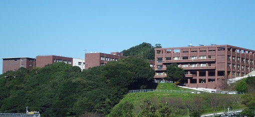 青雲中学校・高等学校（長崎県）